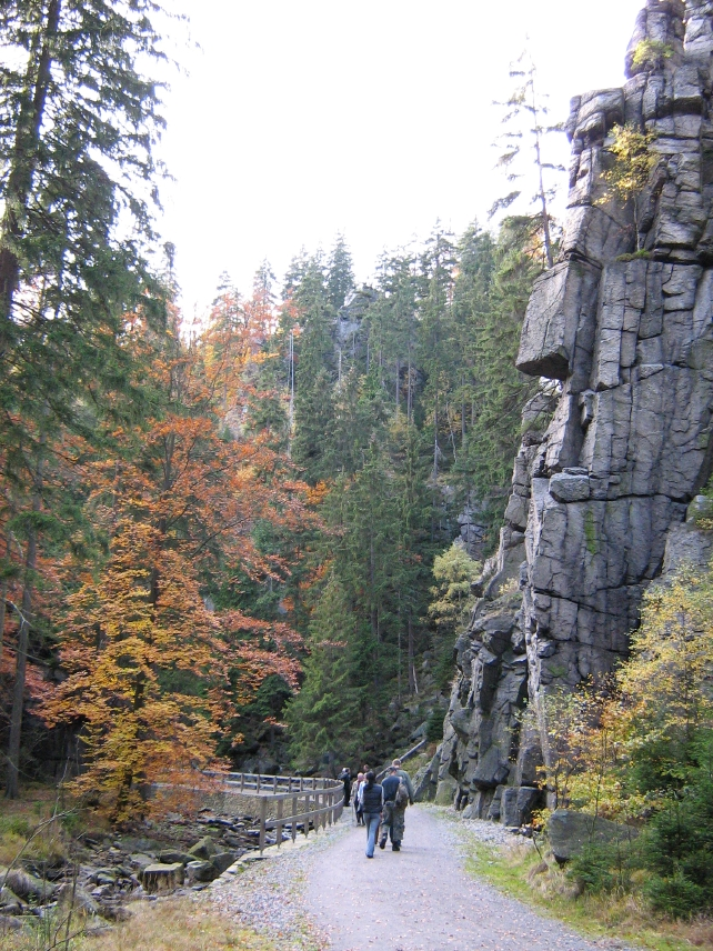 Schwarze Pockau bei Pobershau Autor: G. Wansorra